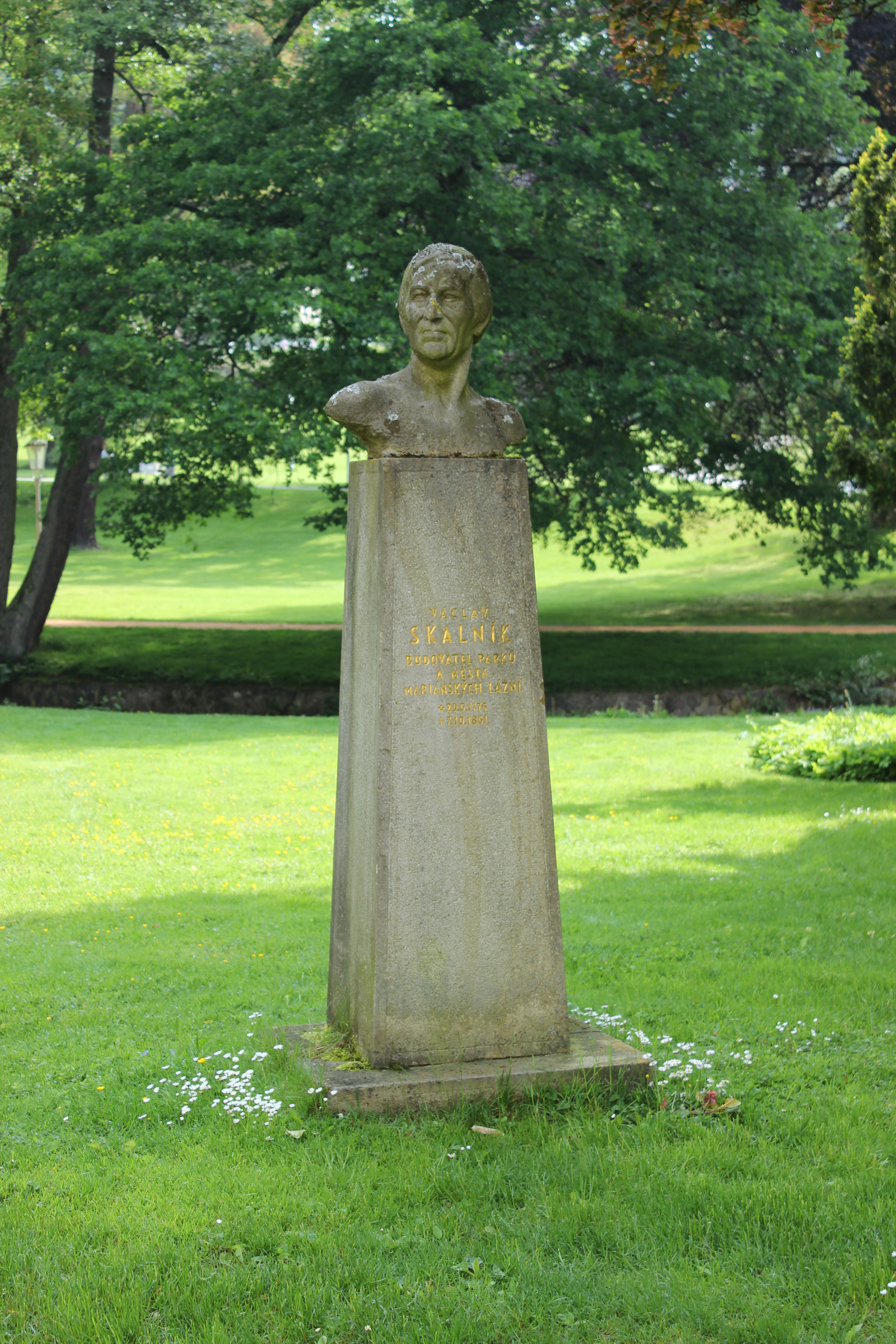 Busta Václava Skalníka na mariánskolázeňské Hlavní třídě. This image was acquired during the event Wikiměsto Mariánské Lázně.